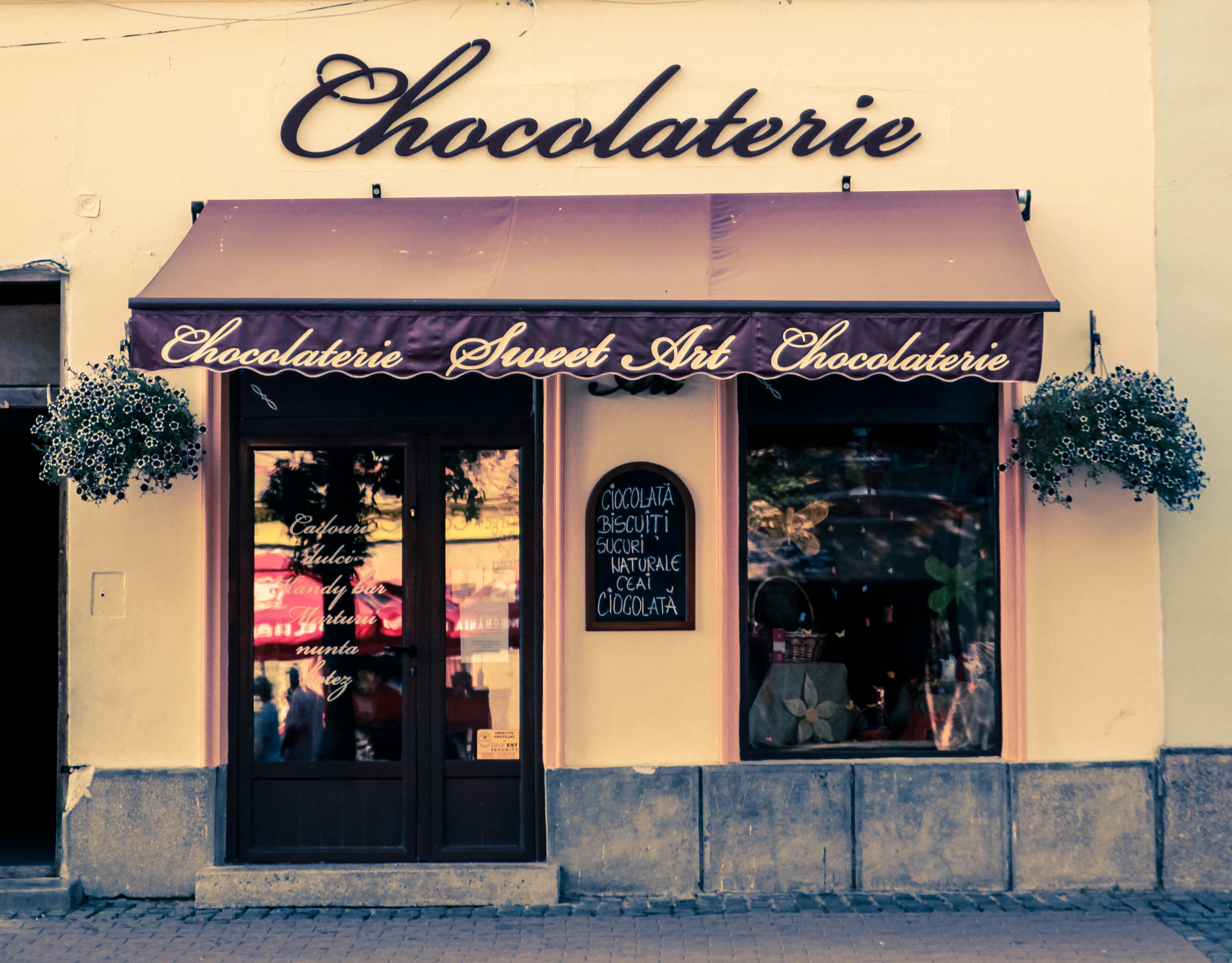 August 2013